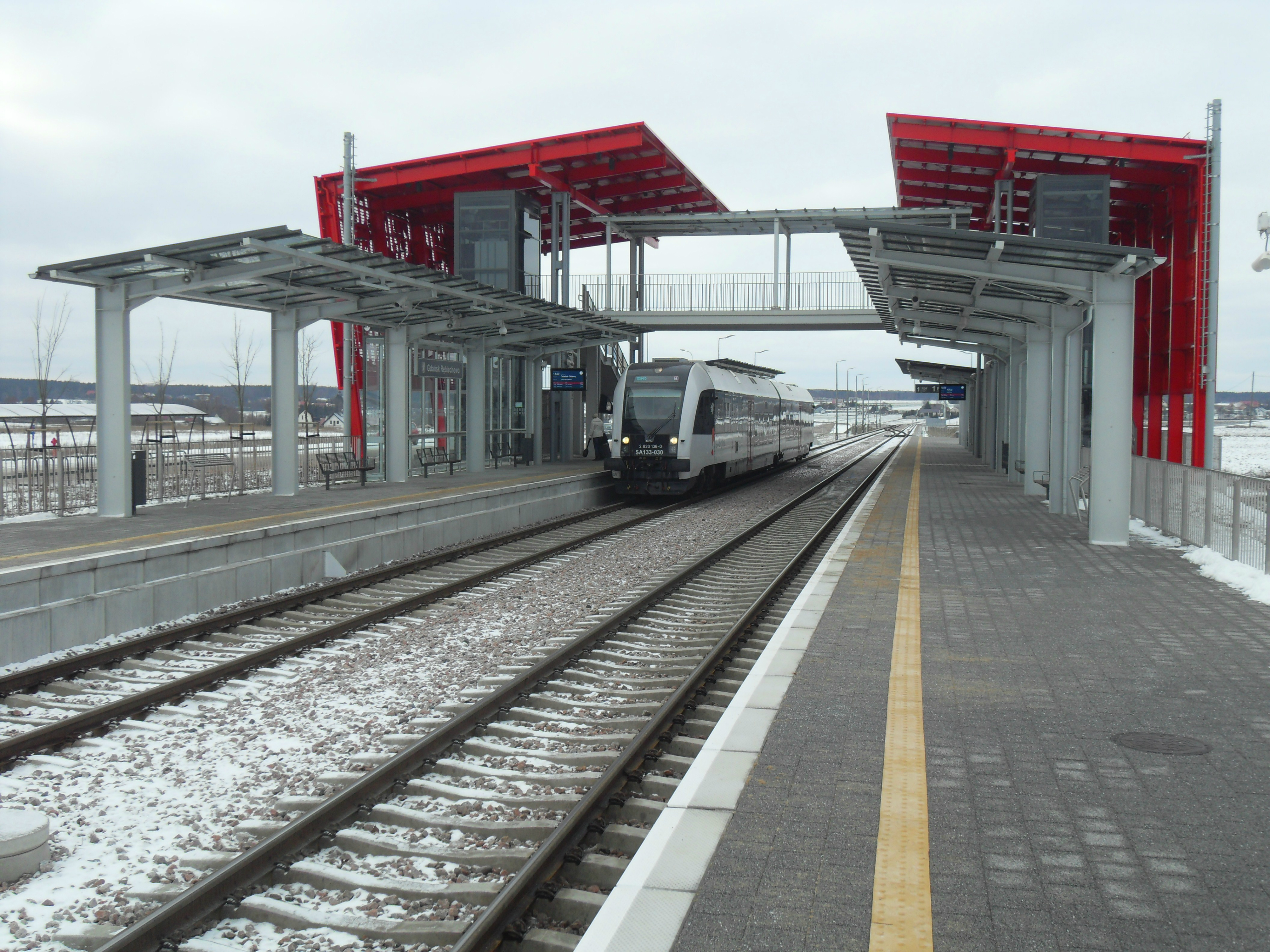 Przystanek kolejowy Gdańsk Rębiechowo (dzielnica Matarnia) i SA133–30.